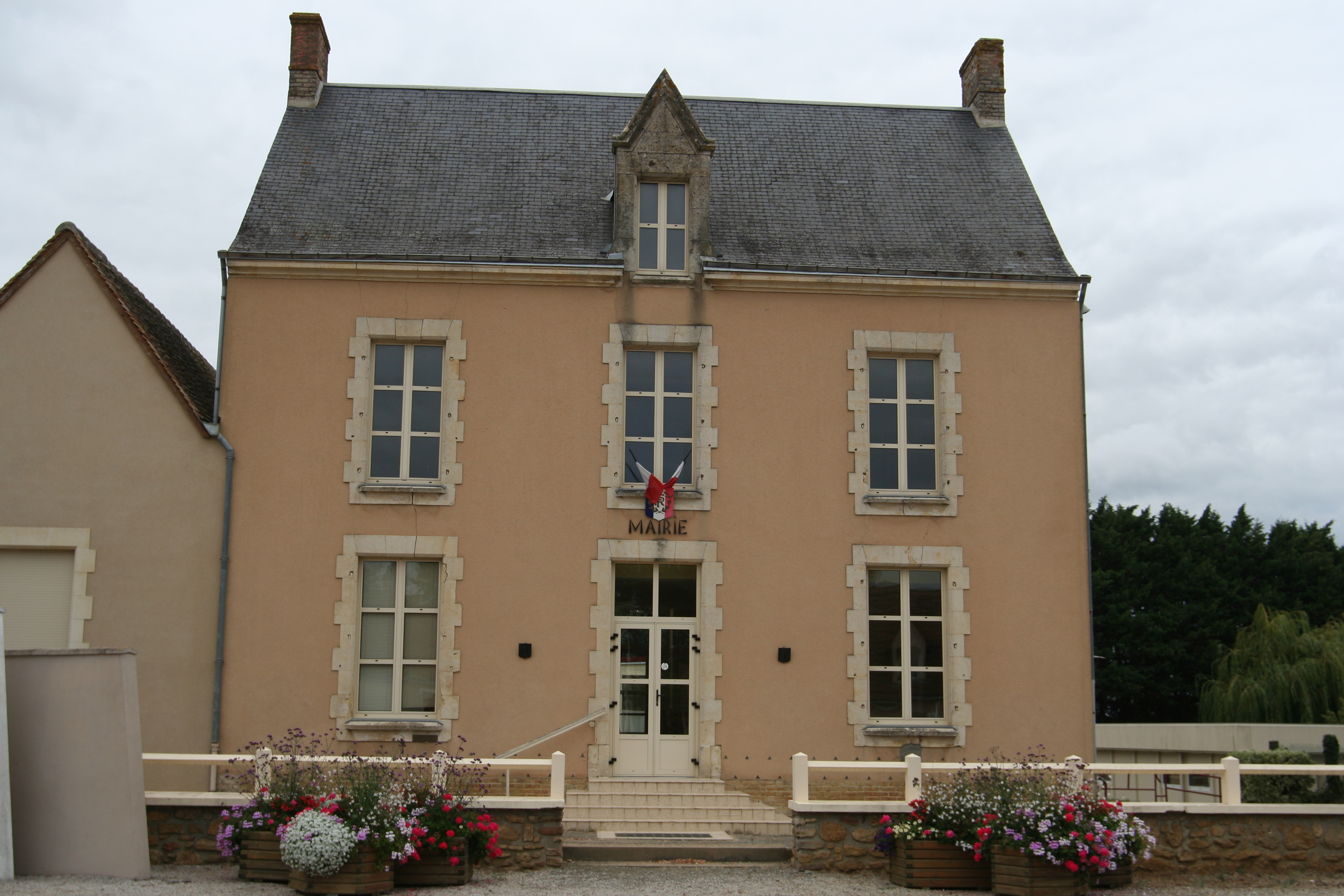 Église de Saint-Corneille.